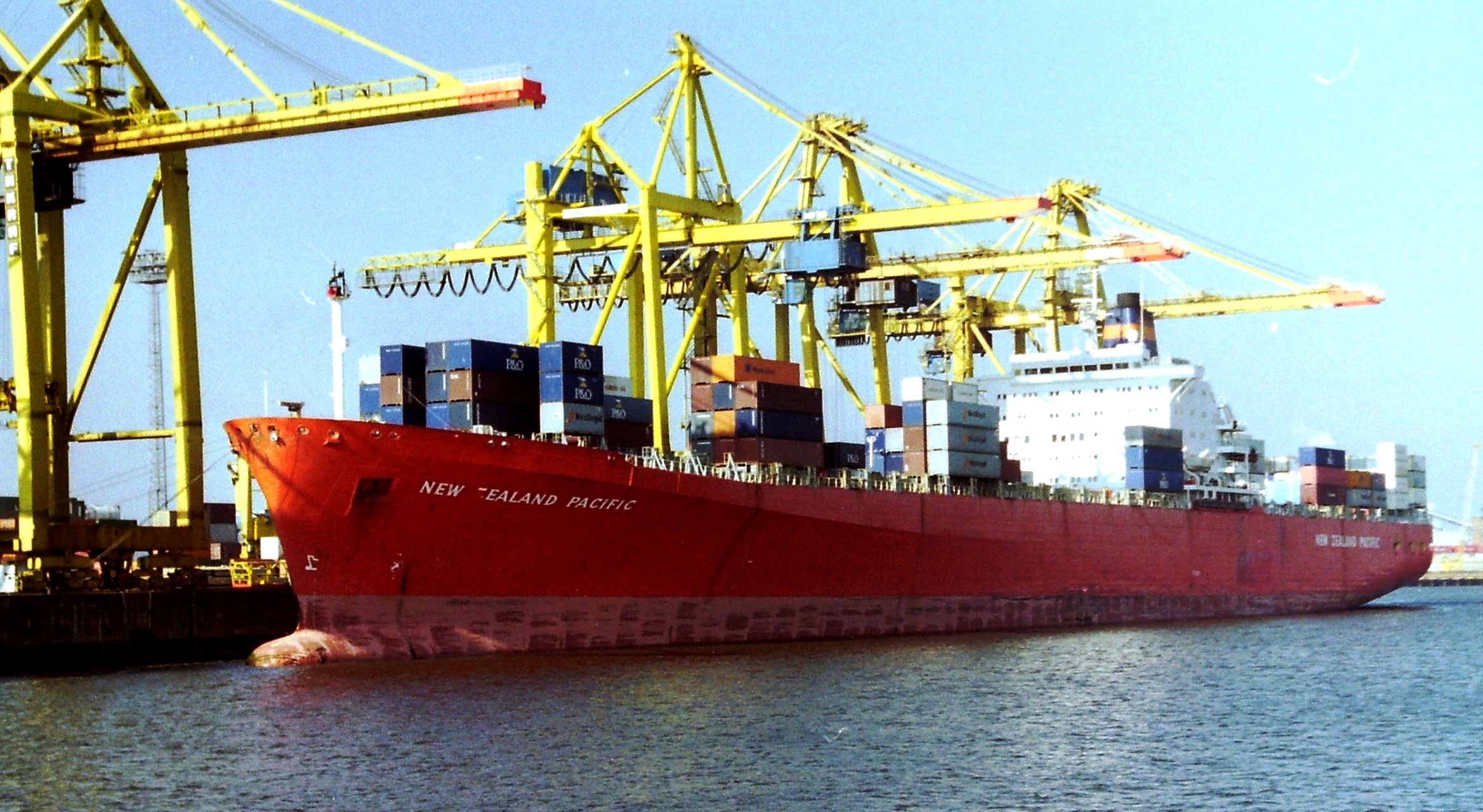 New Zealand Pacific in Hamburg